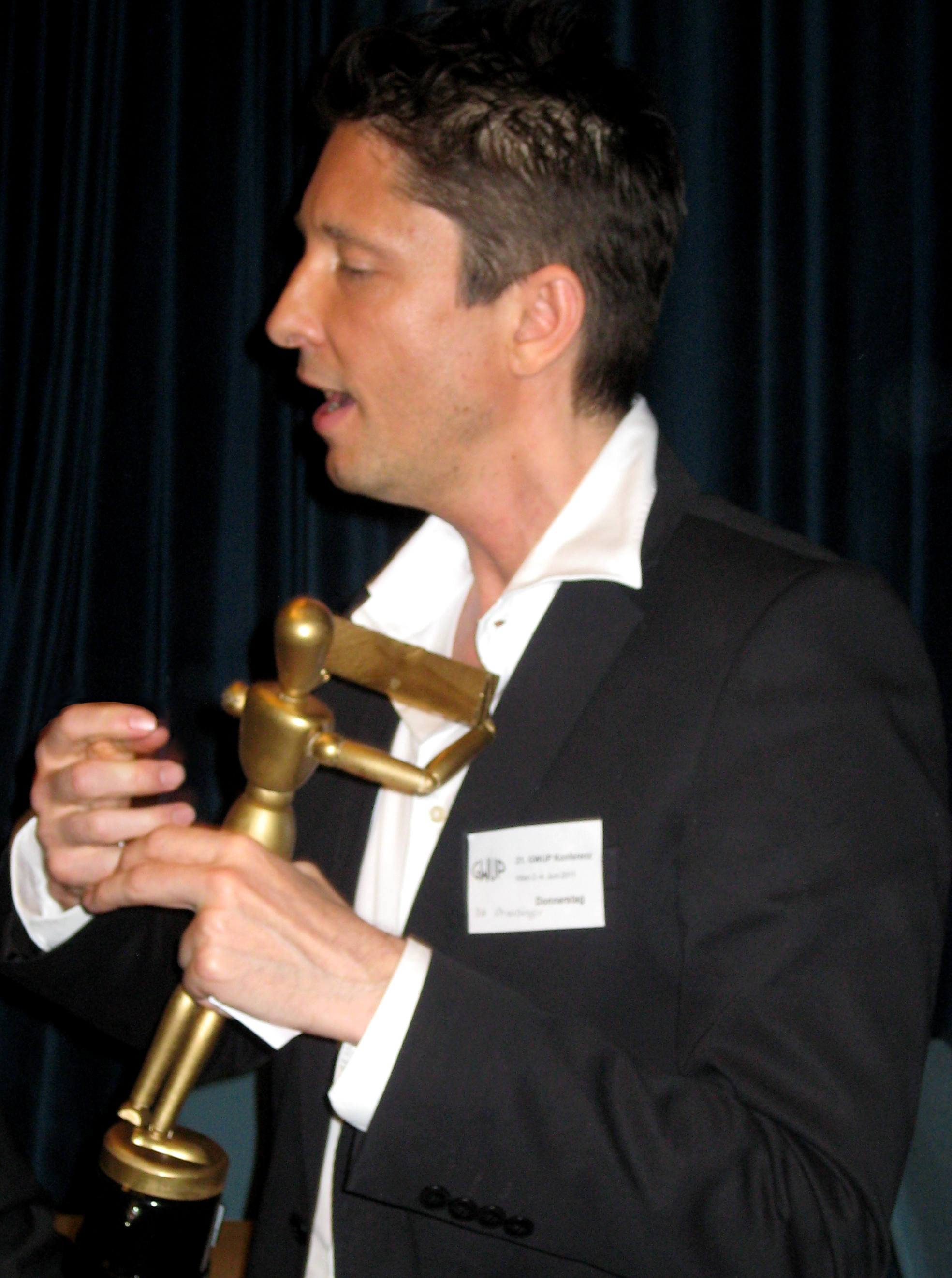 P.A. Straubinger erhält den Negativpreis "Das Goldene Brett" von der Gesellschaft für kritisches Denken für seinen Kinofilm "Am Anfang war das Licht" verliehen.